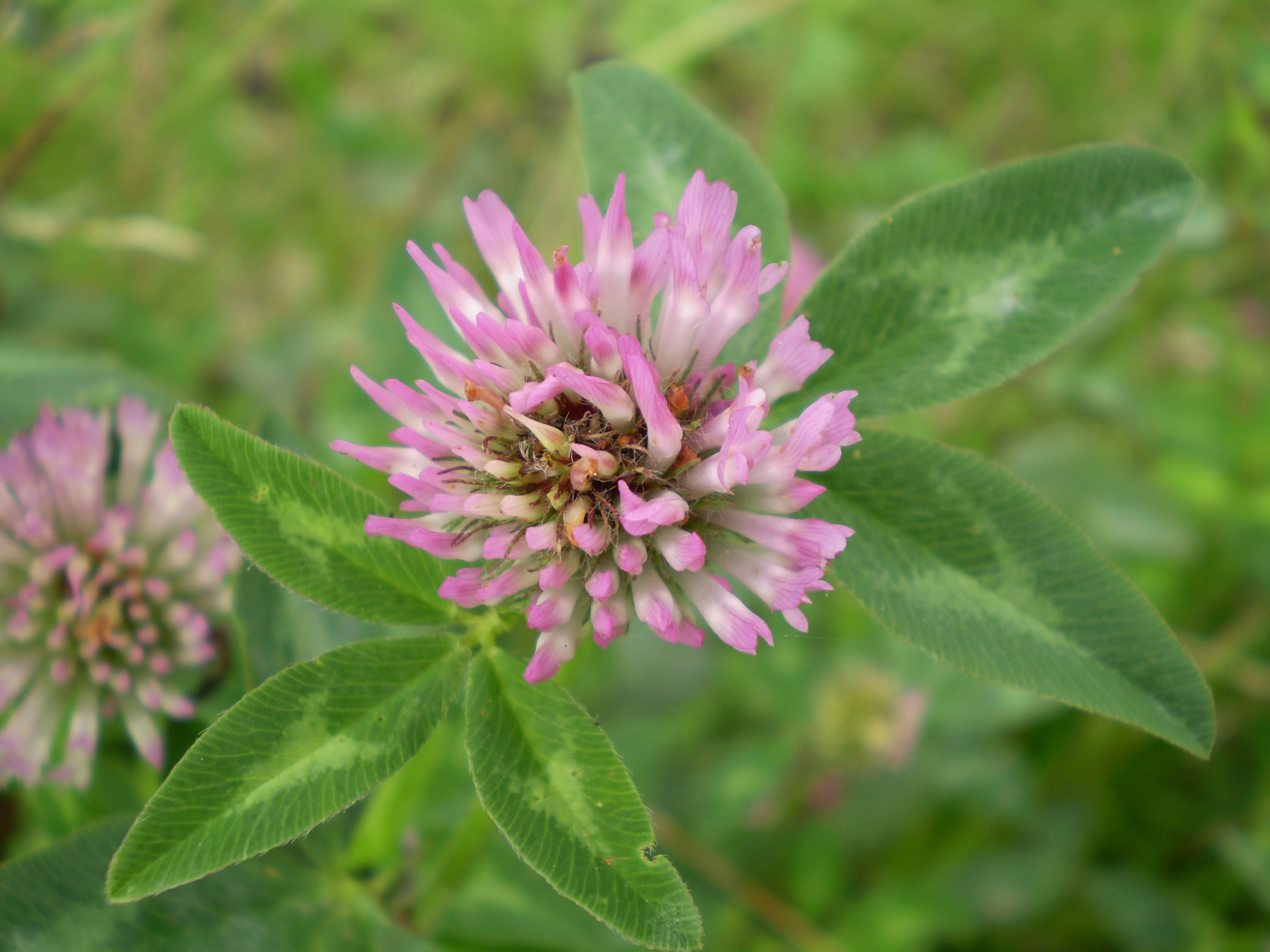 Trifolium.